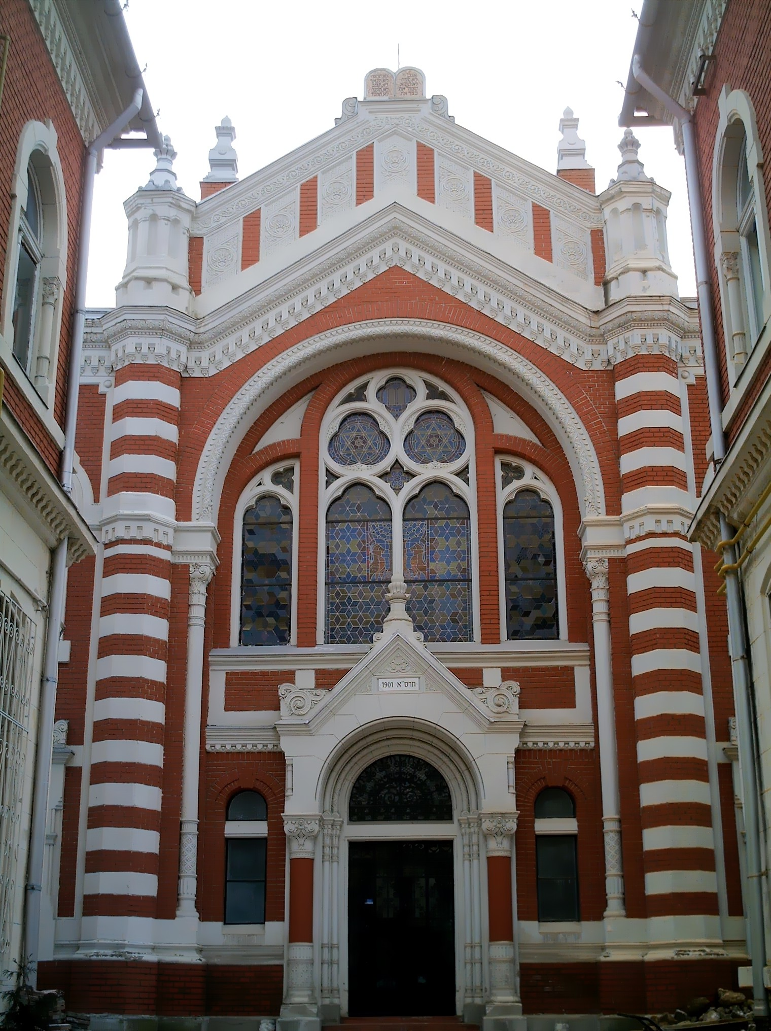 Sinagogue from Brasov, Romania